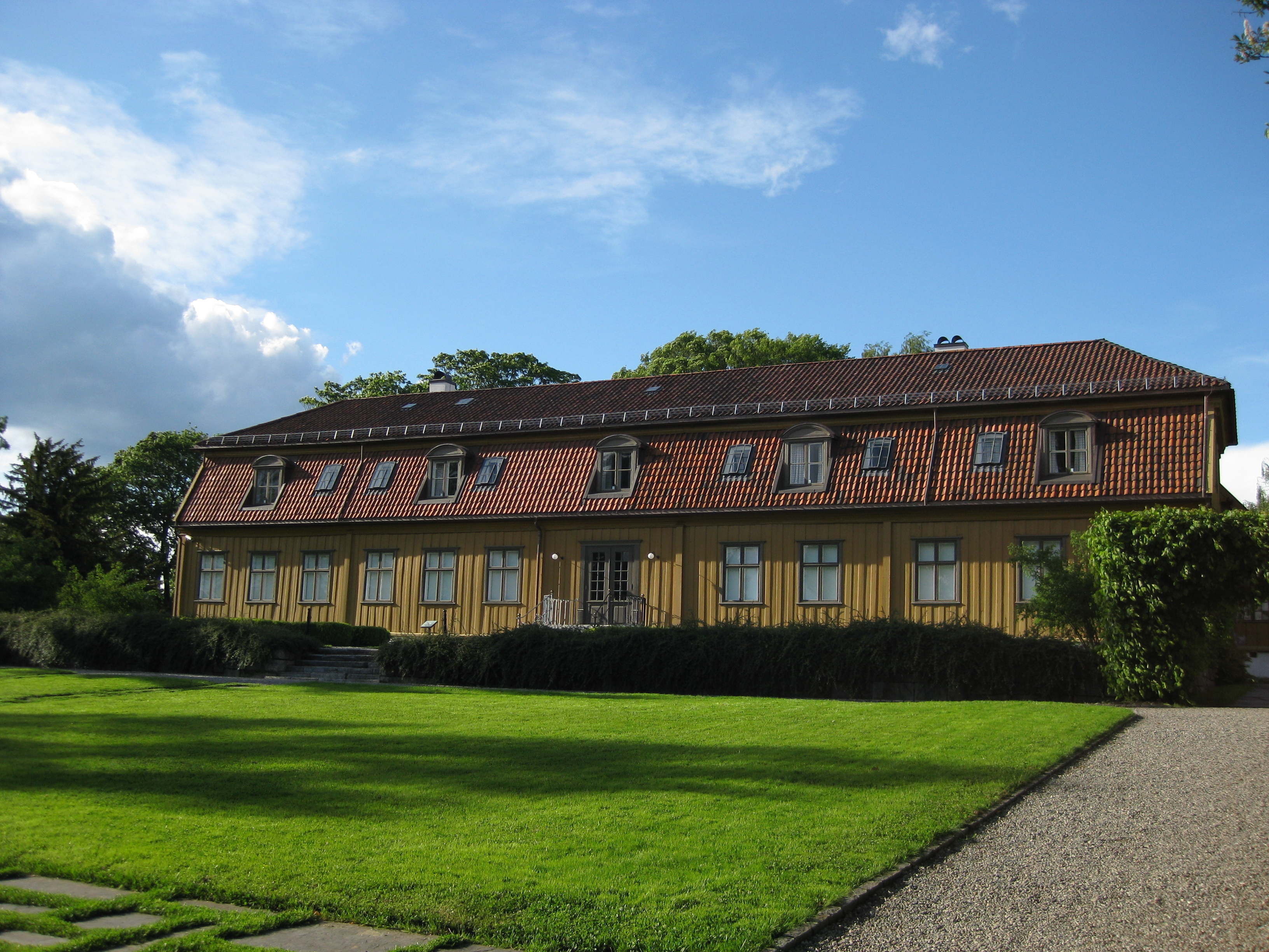 Tøyen hovedgård i Botanisk hage, Oslo.